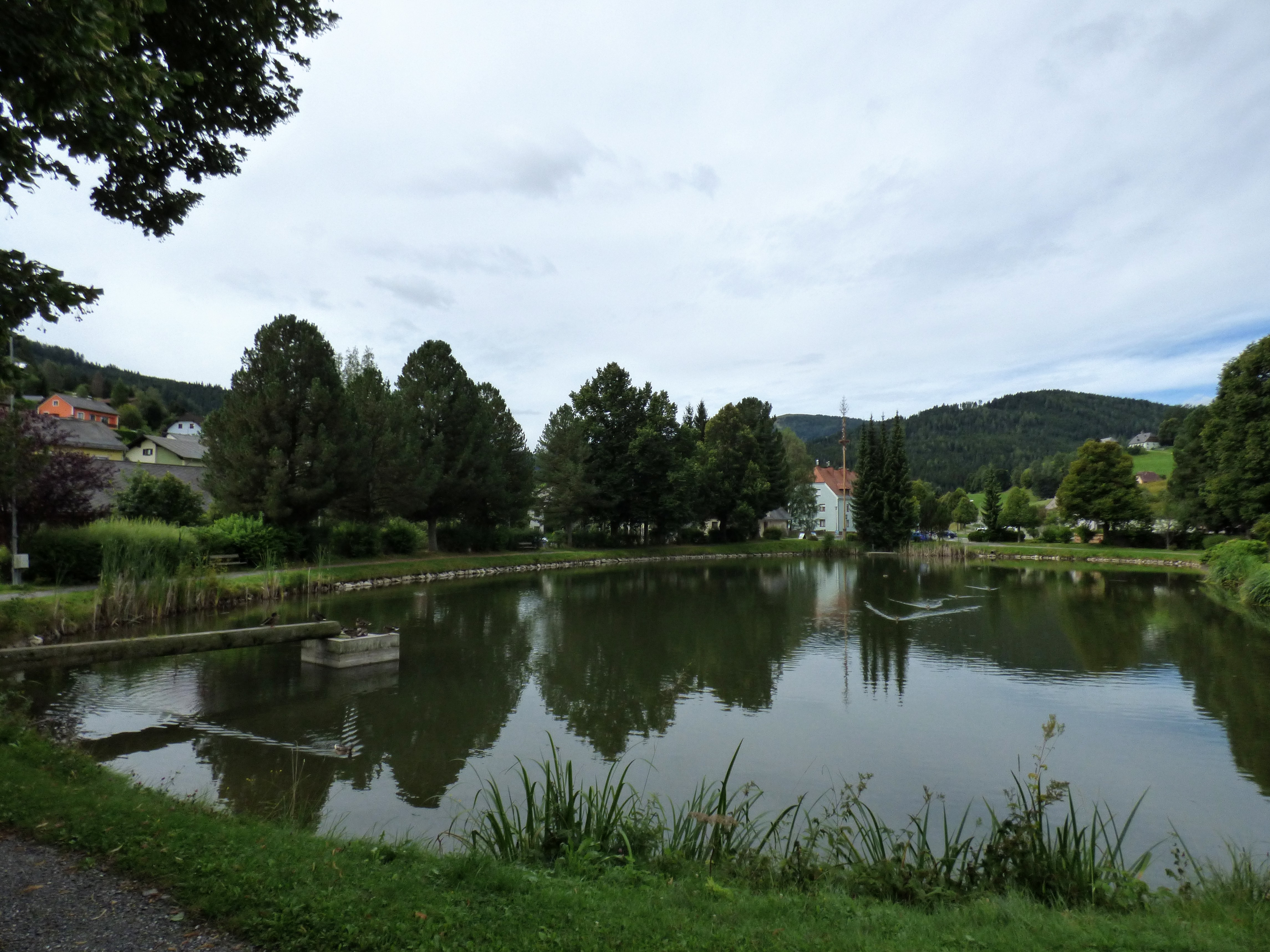 Marktteich Sankt Lambrecht